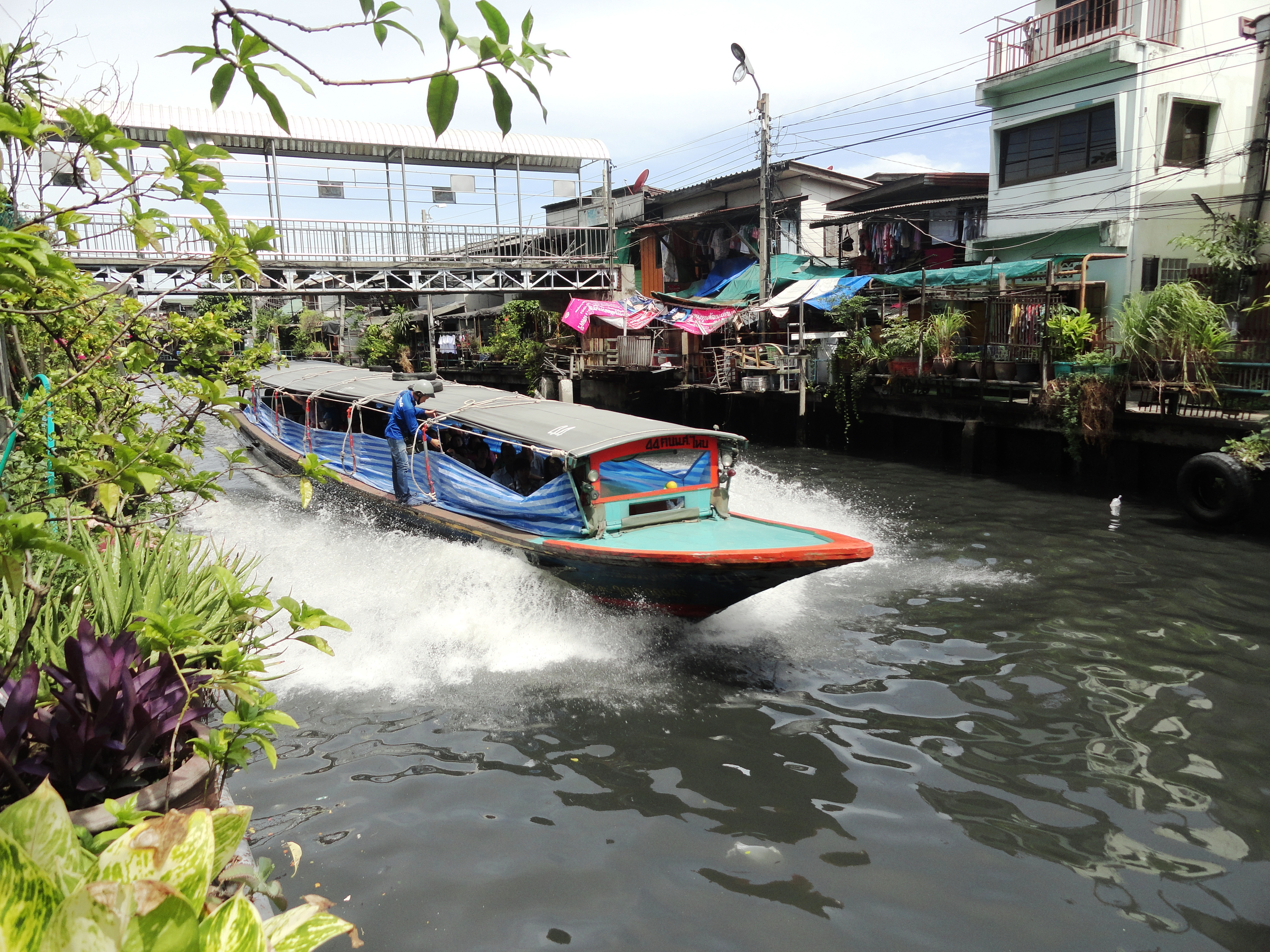 A klong taxi cruising at fast speed Klong Saen Saep in Bangkok.